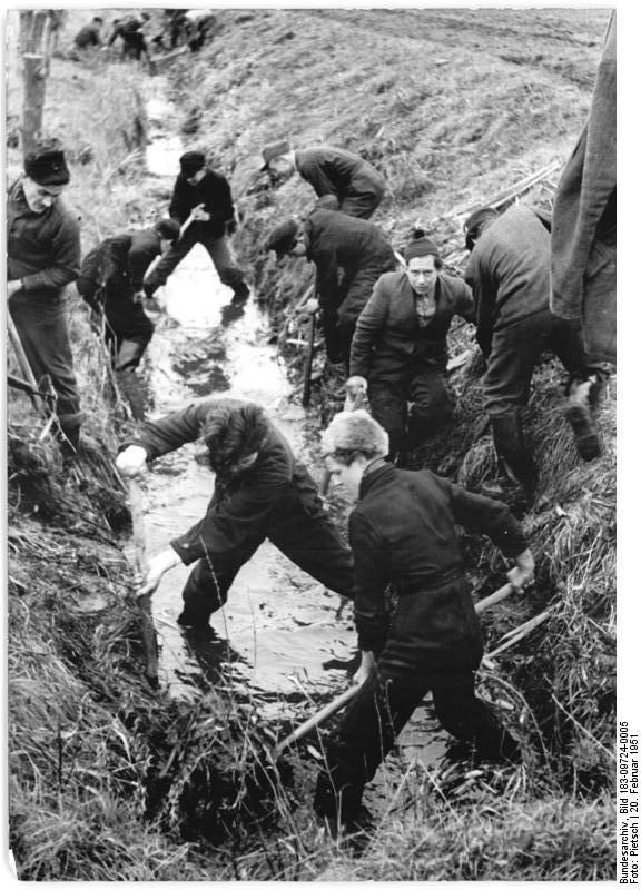 Kuhlrade, Räumen eines Entwässerungsgrabens Illus Pietsch 9724-10-20.2.51 250.000 Hektar Grünland werden entwässert. Mecklenburg steigert seine Hektarerträge durch Gewinnung von Grünlandflächen. Der Landesausschuss der Nationalen Front Mecklenburg unterbreitete am 25.1.1951 der Bevölkerung des Landes einen Plan zur Entwässerung von 250.000 Hektar Grünflächen, die zur Zeit noch versumpft sind und nur teilweise ausgenutzt werden können. Dieser Plan, der wesentlich zur Steigerung der Erträge im Fünfjahrplan beitragen wird, erfordert die Mitarbeit der ganzen mecklenburgischen Bevölkerung. Nach umfangreichen Vorbereitungen wurden bei Einsetzten günstiger Witterung die ersten Melioratinsarbeiten in Angriff genommen. Am 11.2.51 begannen z. Beispiel über 130 Arbeiter und Angestellte der Boddenwerft Damgarten und zahlreiche Bauern in der Gemeinde Kuhlrade bei Ribnitz mit der Räumung der wichtigen, über fünf Kilometer langen Zuflußgräben zum Ribnitzer Bodden. UBz: Diesen Jugendlichen der Boddenwerft macht die Arbeit Spaß, auch wenn sie im Wasser stehen.